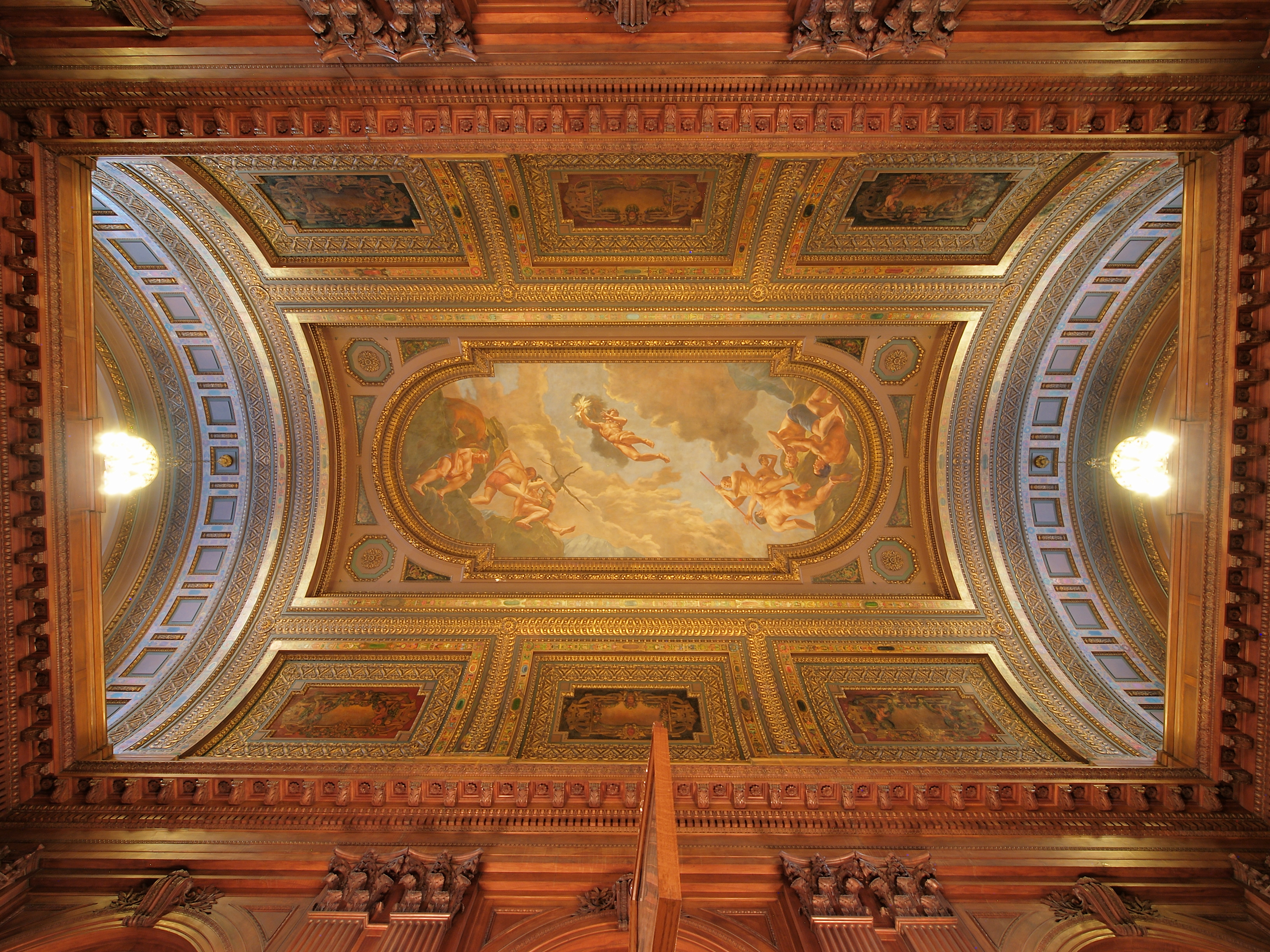 McGraw Rotunda, ehemals Central Hall. Deckengemälde "Prometheus Bringing Fire to Men" (1942, Edward Laning (1906–1981)) im Tonnengewölbe des rechteckigen Raums. Third floor im Osten der New York Public Library, Main Branch, Fifth Avenue.